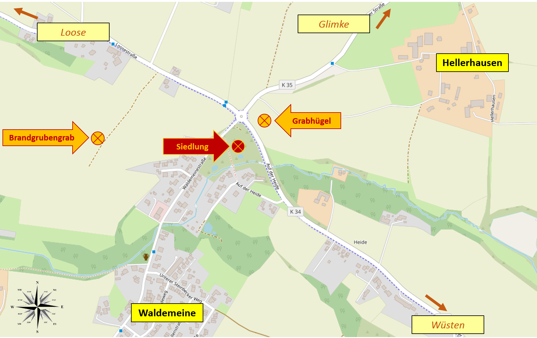 Karte: Lage der von Leo Nebelsiek um 1935 durchgeführten Grabungen bei Hellerhausen in Wüsten, Ortsteil von Bad Salzuflen im Kreis Lippe / NRW / Deutschland